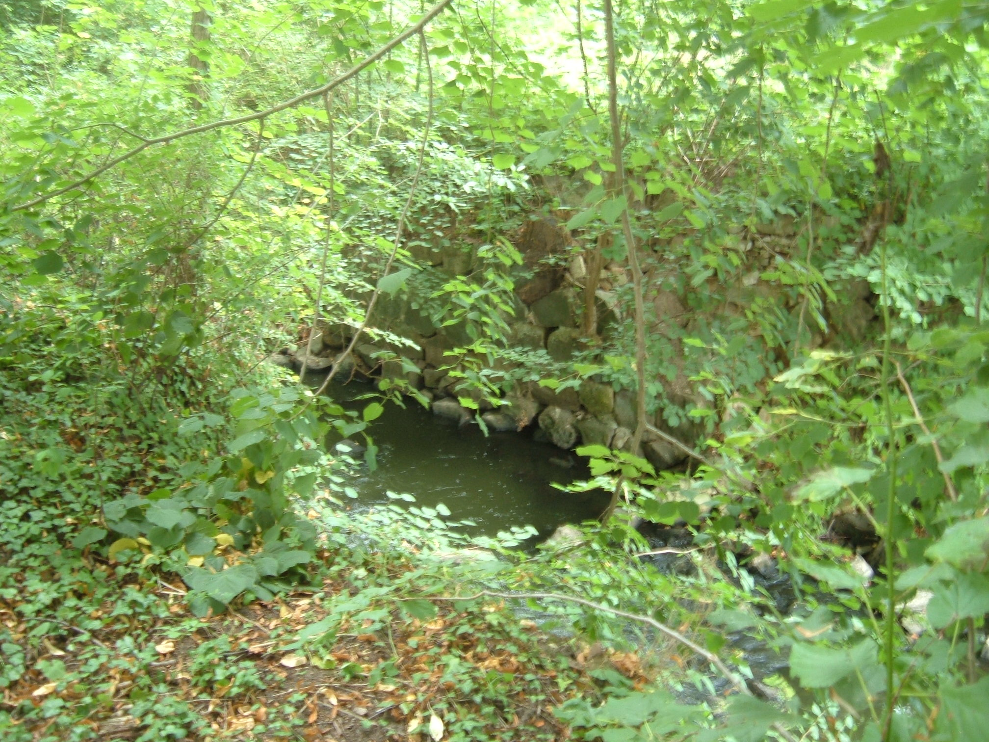 Uferlandschaft am Fluss mit Blick auf Brückenfundament in Szumiąca (Kamień Pomorski), Polen.